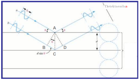 Bragg-en difrakzioa